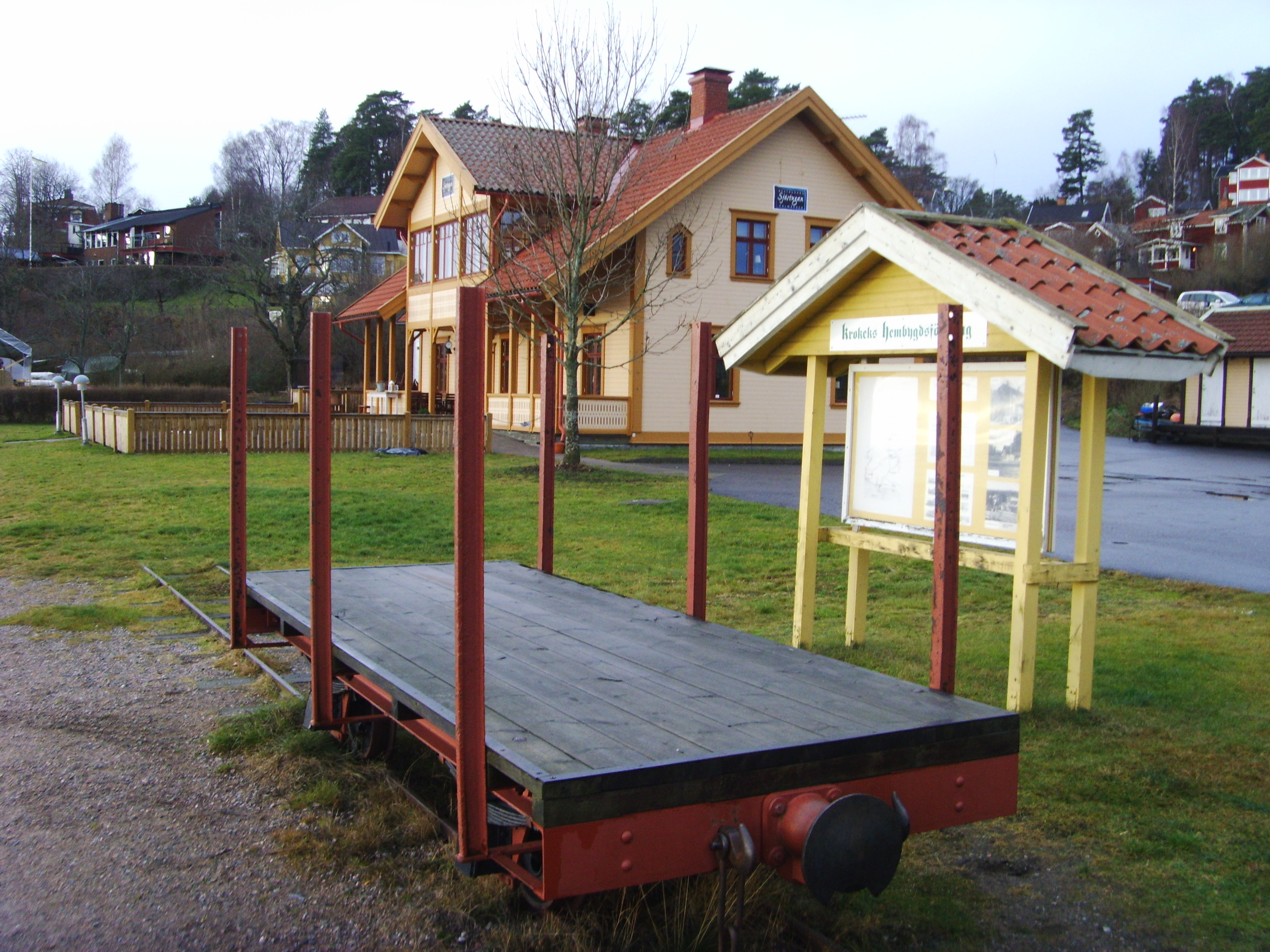 Kolmårdens station i Sandviken vid Bråvikens norra strand, är en av de minnesmärken som kvarstår från den upprivna smalspåriga "Nunnebanan". Numera används lokalerna till restaurangverksamhet och namnet på stationen har överförts till den vid Nyköpingsbanan belägna fd Krokeks station.